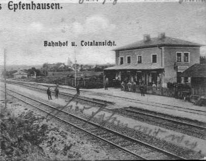 Empfangsgebäude des Bahnhofs Epfenhausen von der Gleisseite im Jahr 1910, im Vordergrund die Schüttbahnsteige